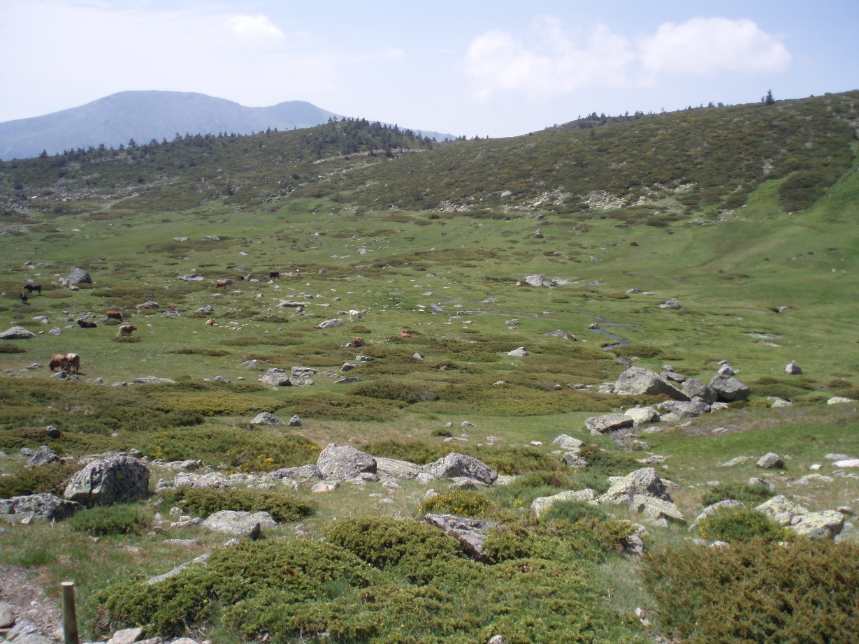 Pradera próxima al circo de Peñalara, ubicado en la Comunidad de Madrid (España).